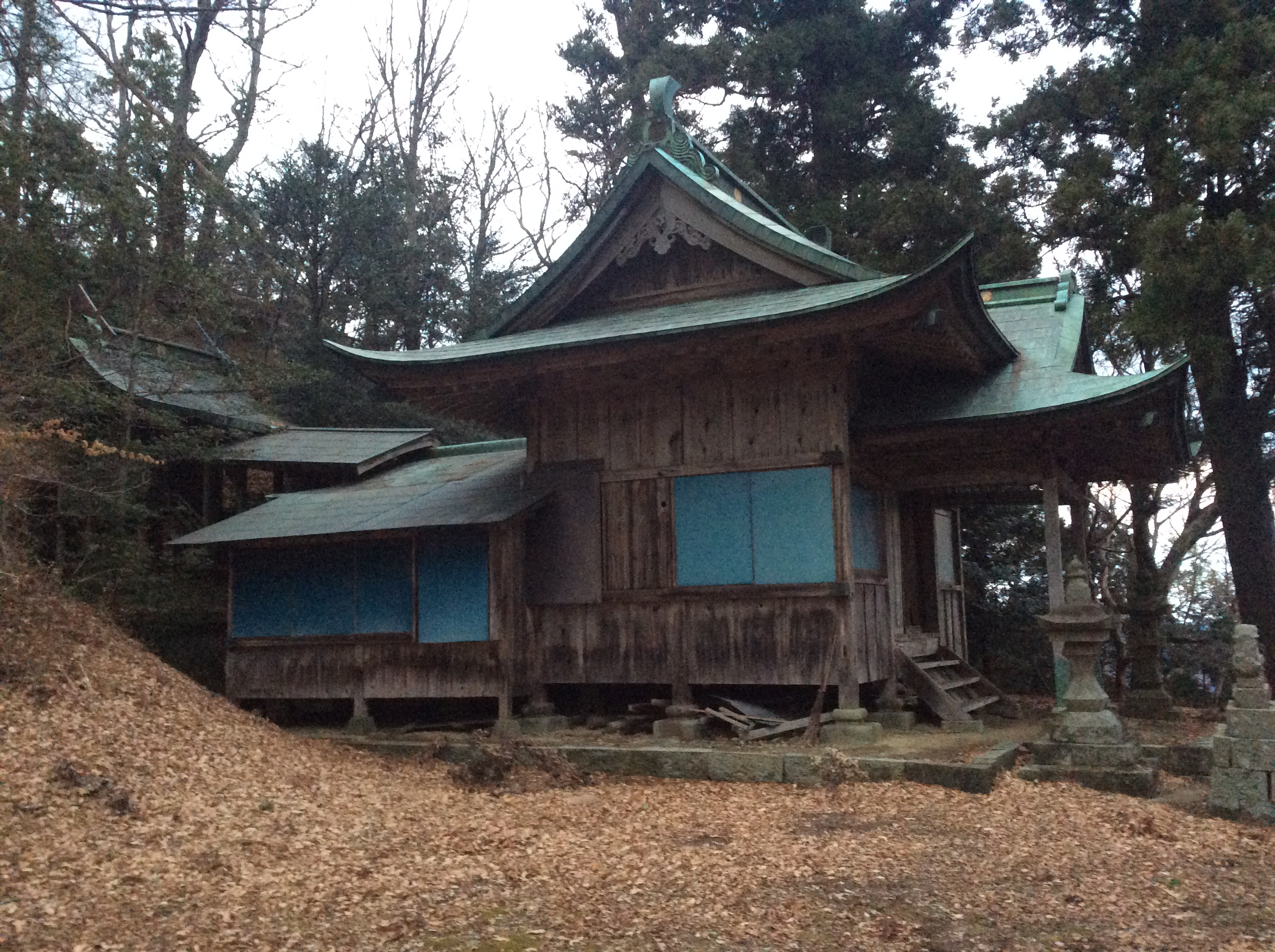 伊笠神社（阿波市）